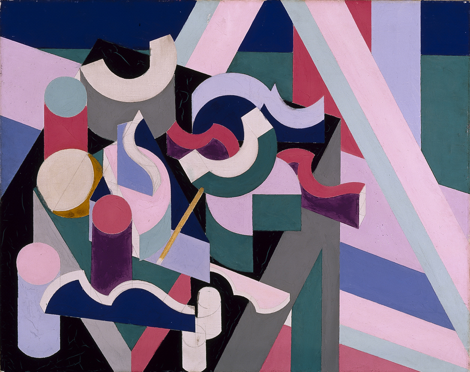 Stilleben,, Öl auf Leinwand